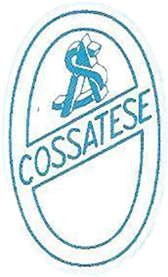 Logo AS COSSATESE